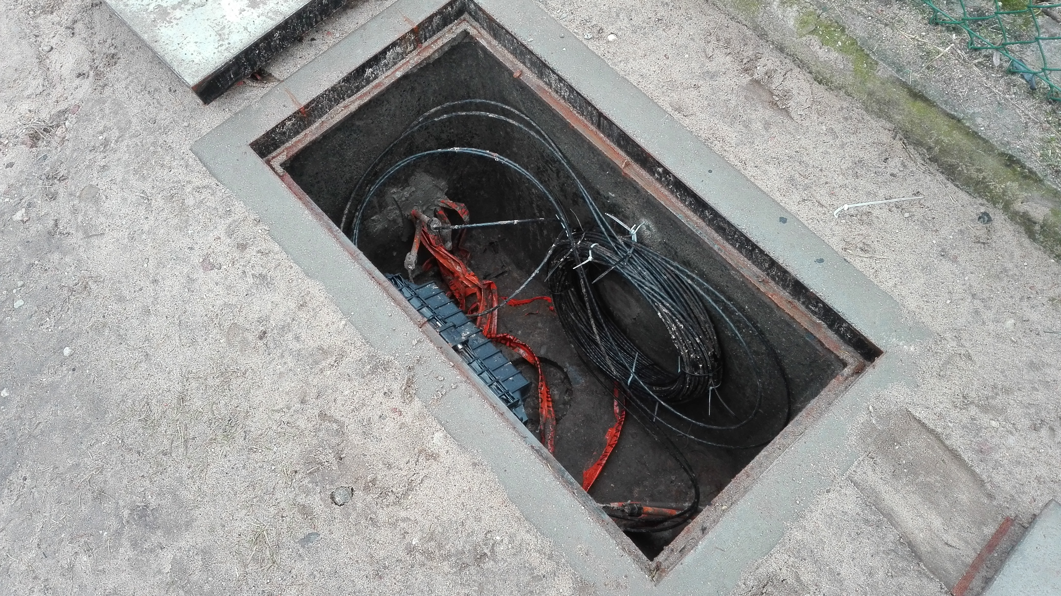 Studnia kablowa wewnątrz której znajduje się mufa światłowodowa, i mikrokable światłowodowe.